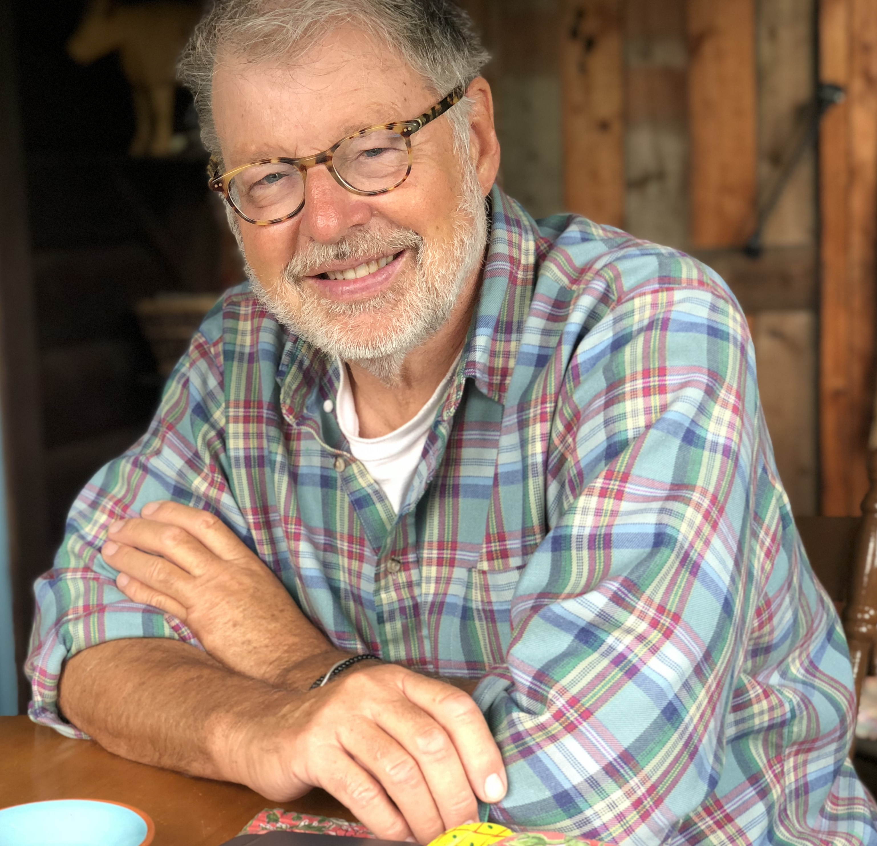 Herbert Bopp im Blockhaus am Lac Dufresne